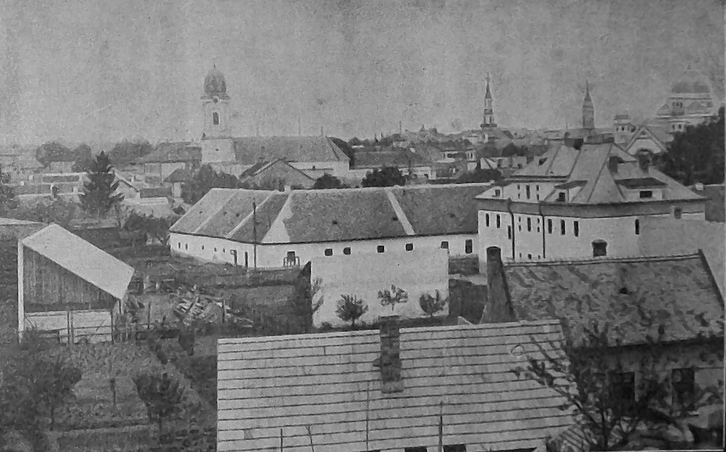 Panoráma Lučenca od cintorína v roku 1926